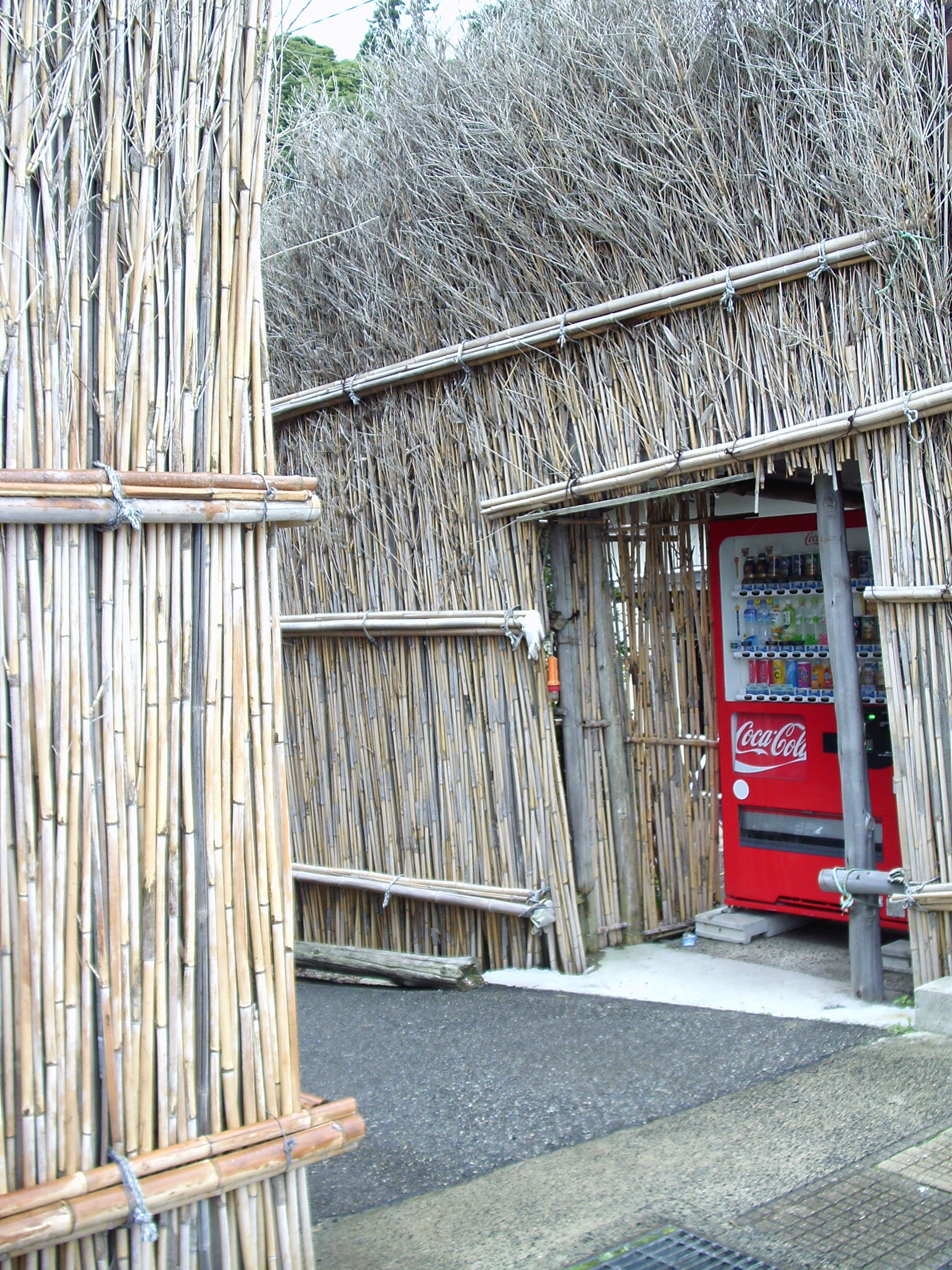 重要文化的景観「大沢・上大沢の間垣集落景観」ー大沢地区：自販機も間垣に守られる